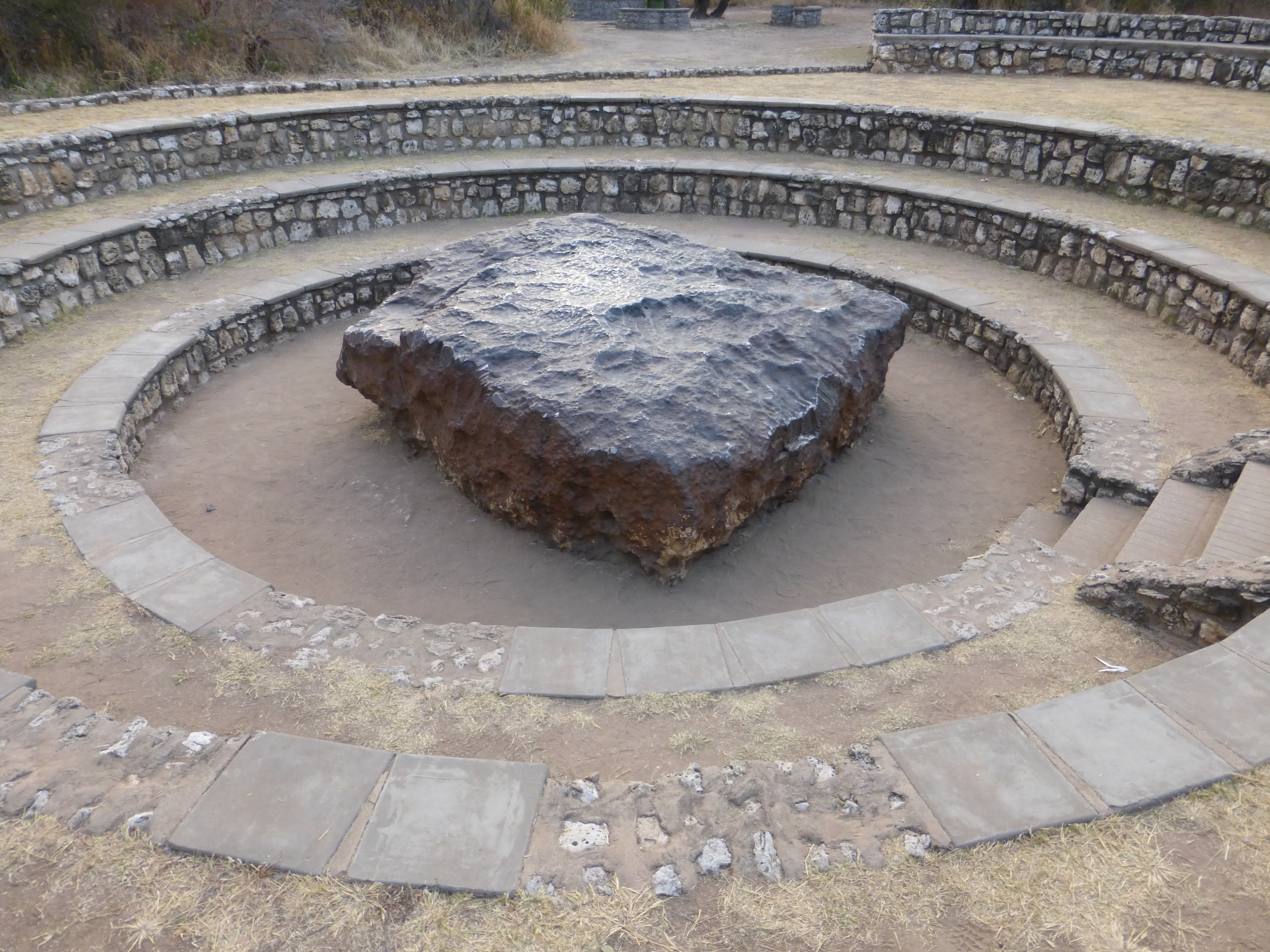 Hoba meteorite. Grootfontein, Namibia.